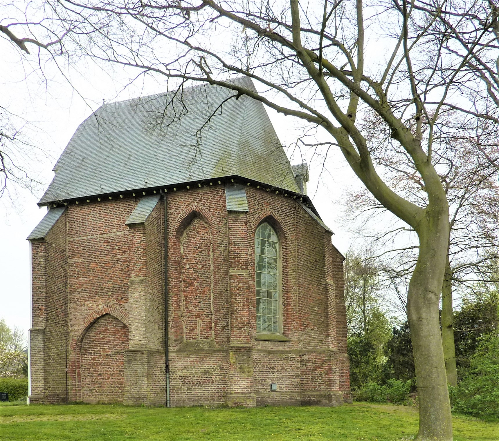 Nederlands Hervormde Kerk, Overasselt